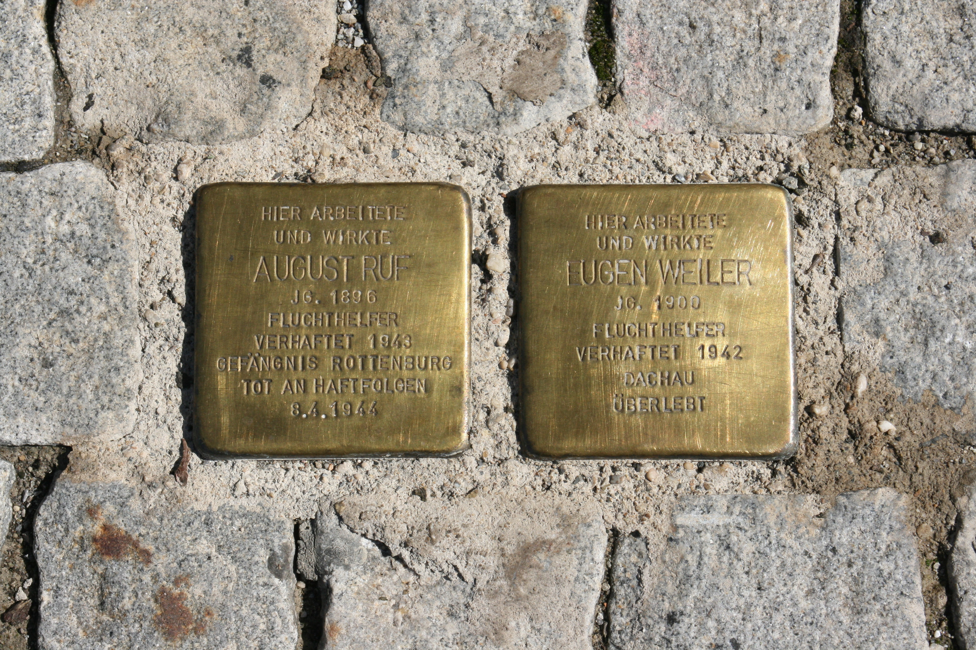 Hauptstraße in Singen (Hohentwiel)